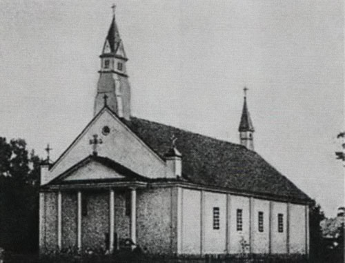 Беларуская (тарашкевіца): Хатаевічы (Chatajevičy). Новы касьцёл Сьвятога Дамініка